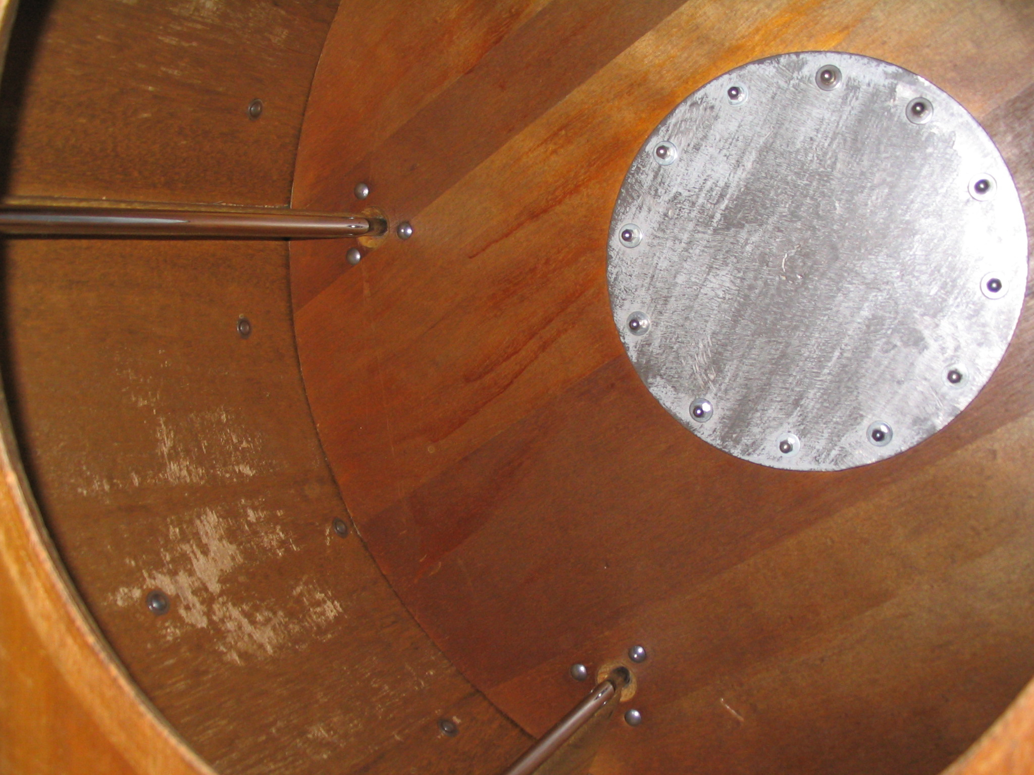 Blick in die Pelz-Läutertonne bei geschlossenem Schüttelsieb. Hersteller Maschinen - Ofenbau Hindenlang, Lobbach b. Heidelberg. Typ 310 LSF, Baujahr 1988 gesehen in der Firma Lederreinigung Dieter, Höninger Weg 107, 50969 Köln-Zollstock Inhaber: Theodoro Saracino. Lederreinigung, Leder-Möbelreinigung, Lederfärberei, Pelzreinigung